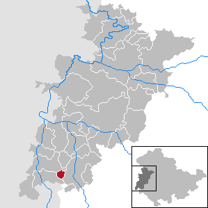 Gerstengrund in Thuringia - Wartburgkreis